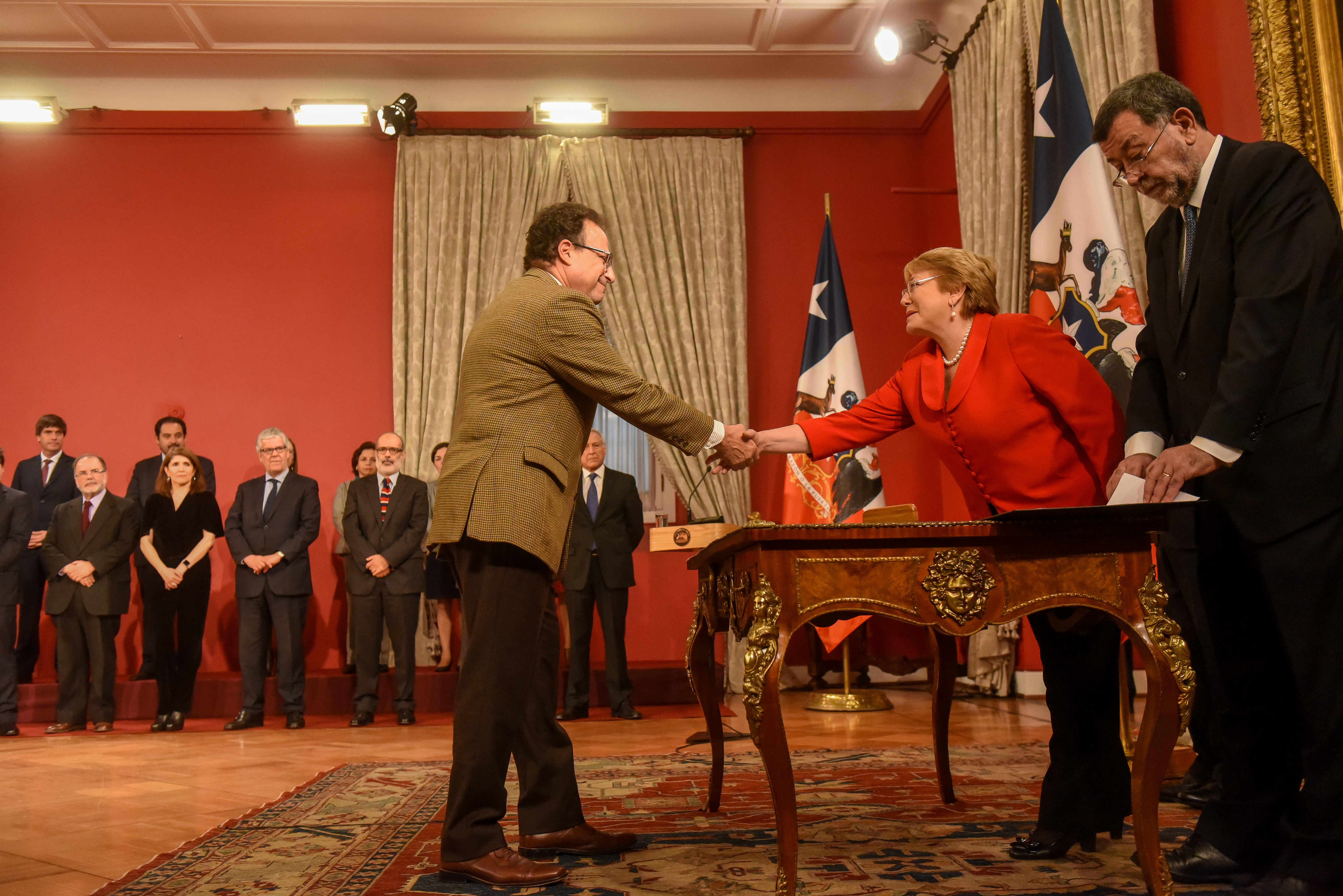 Cambio de Gabinete